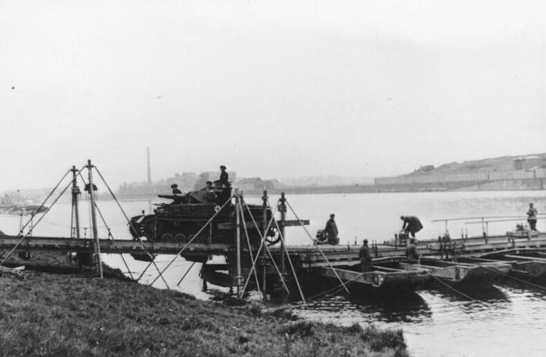 Panzerkraftwagen setzen auf einer schnell errichteten Pioniernotbrücke über die Maas. 16. 5. 40 Pk Ho F 1475 Wb "KG" "FR. OKW."